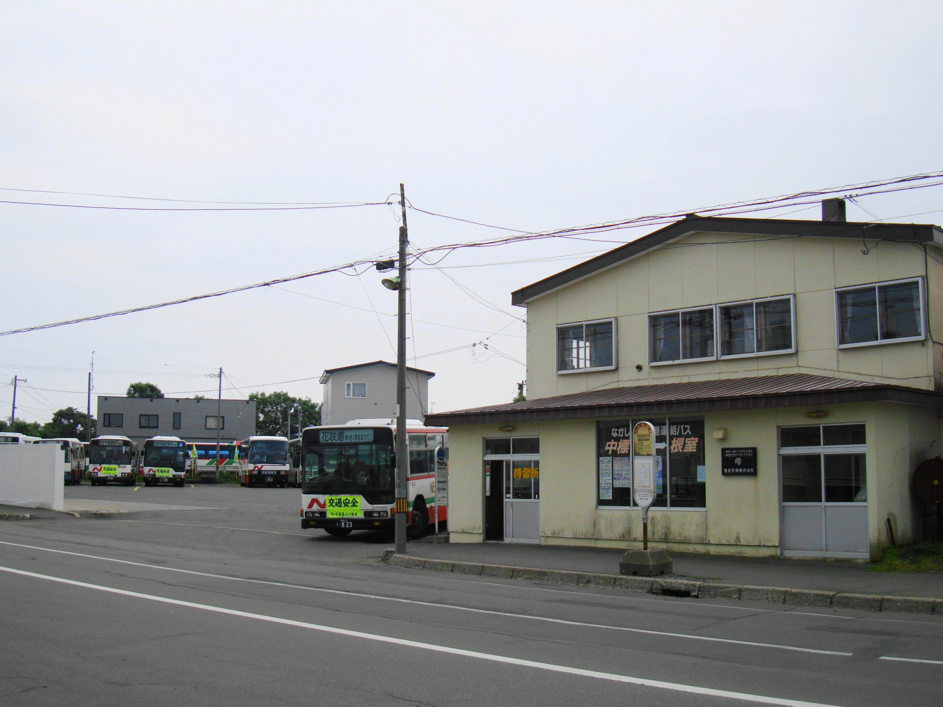 Ariiso depot